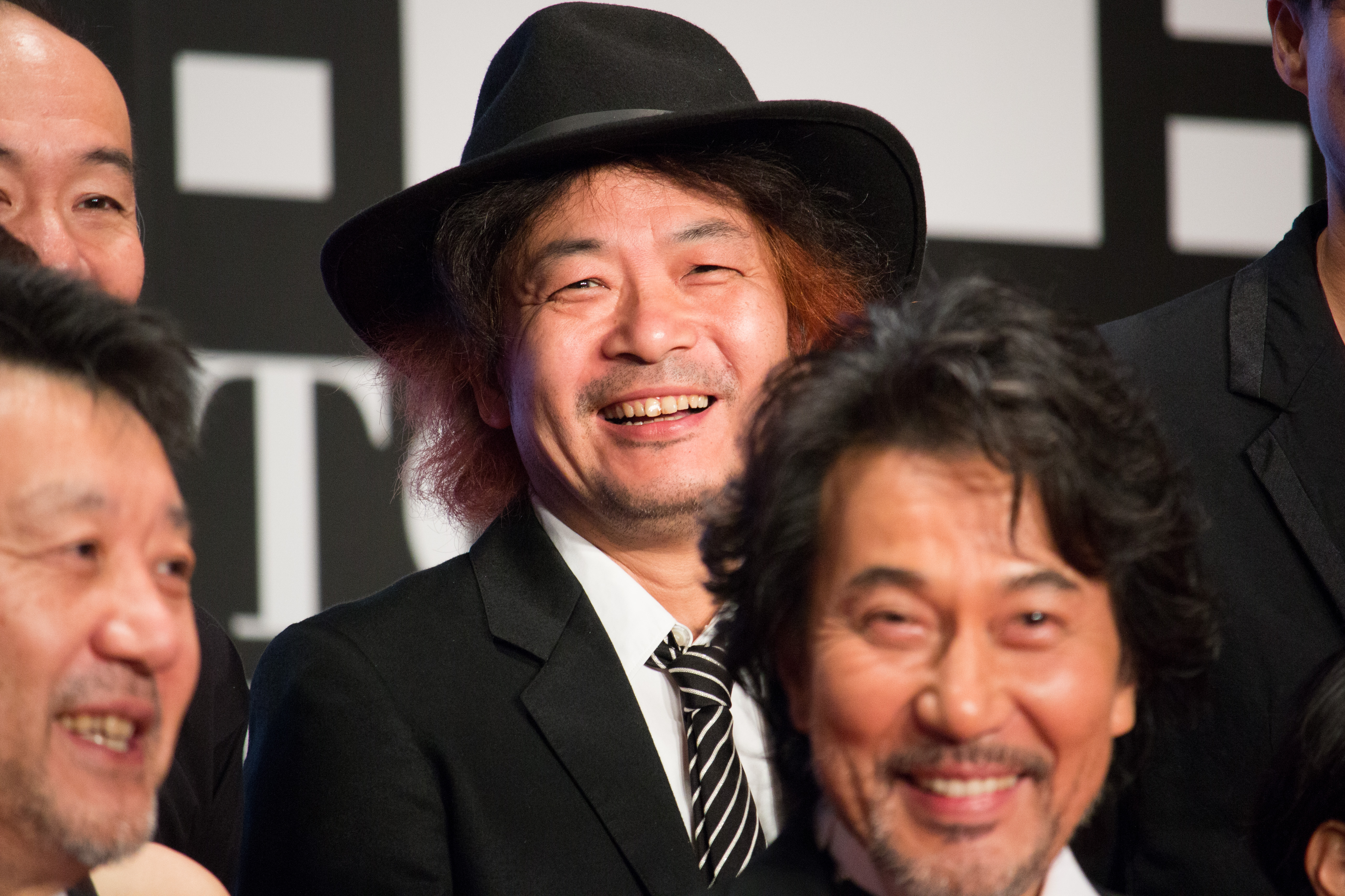 第28回 東京国際映画祭 オープニングセレモニー 園子温 (ラブ&ピース)